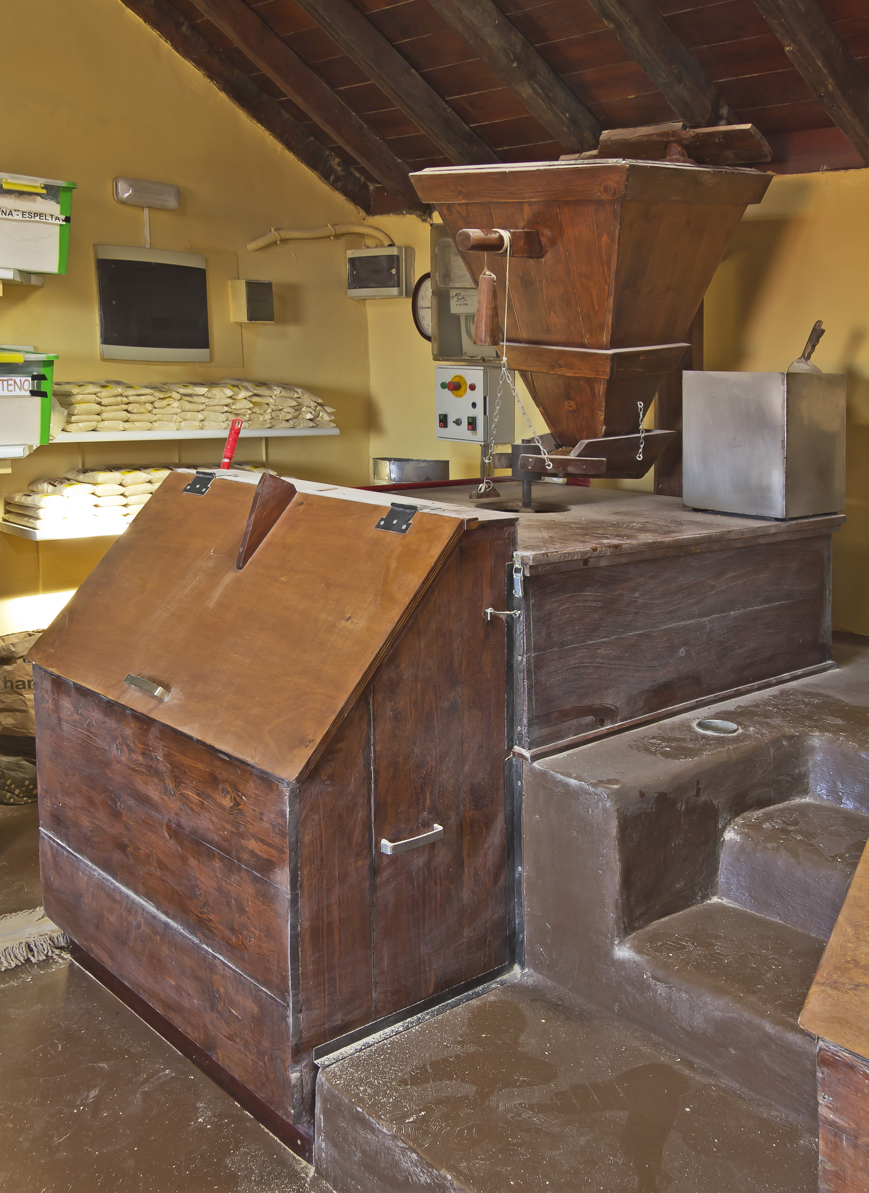 Gofiomühle Don Chano La Orotava S/C de Tenerife, Mahlwerk